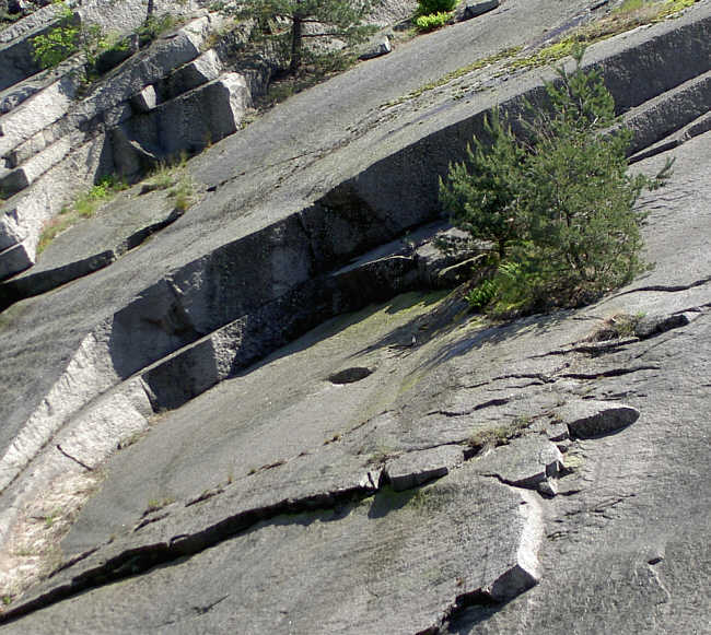 Granit am Schloßberg in Flossenbürg. Das Gestein ist hier zwiebelschalenförmig gelagert.